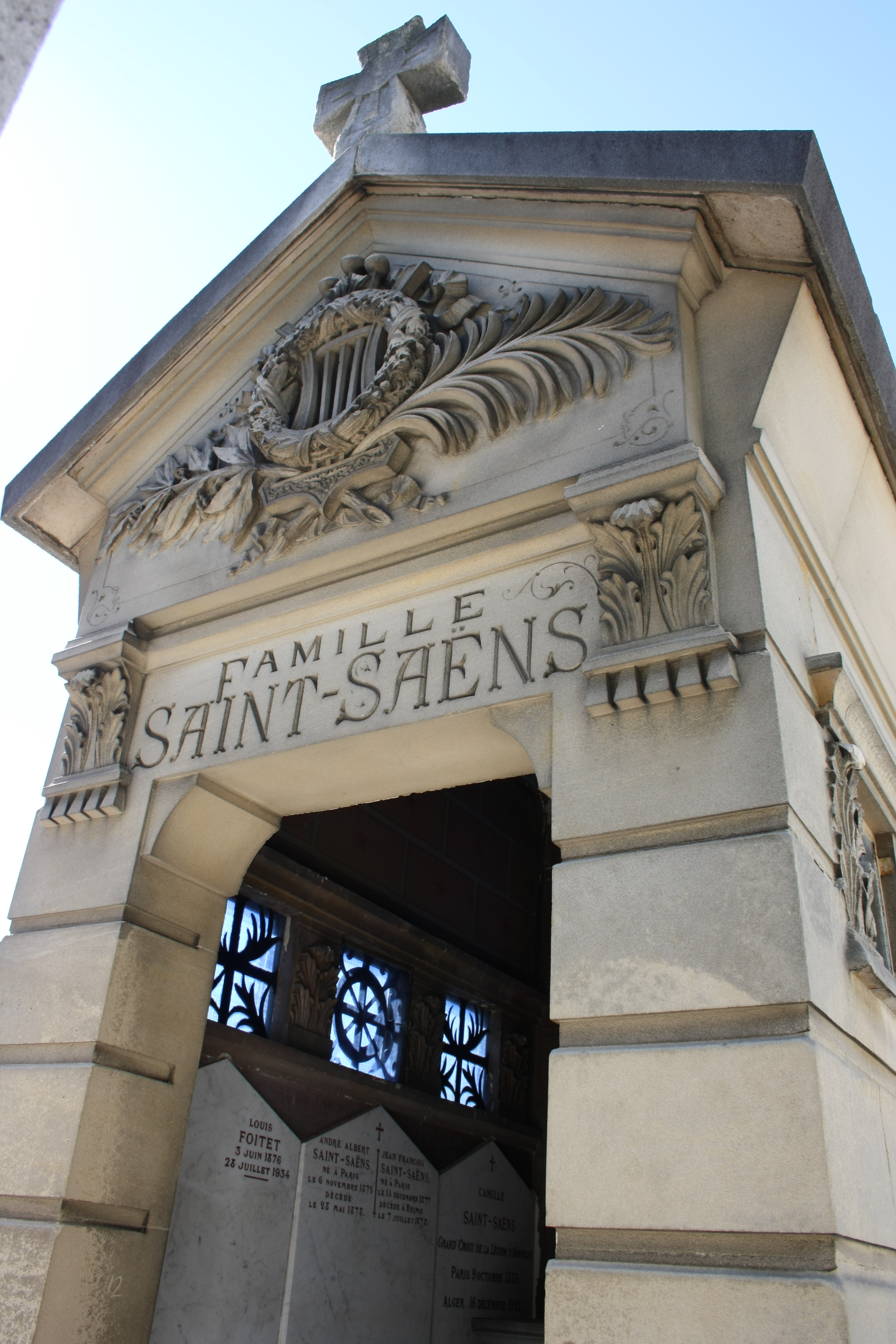 Grabädikula Famille Saint-Saëns auf dem Friedhof Montparnasse in Paris, Gedenktafel an Camille Saint-Saëns (1835-1921)